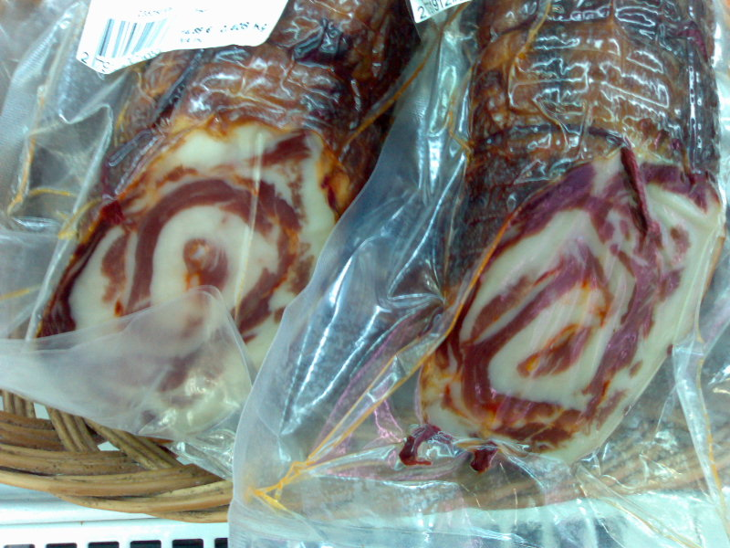 Paia, um enchido do Alto Alentejo, em Portugal. Paia, a portuguese traditional sausage.